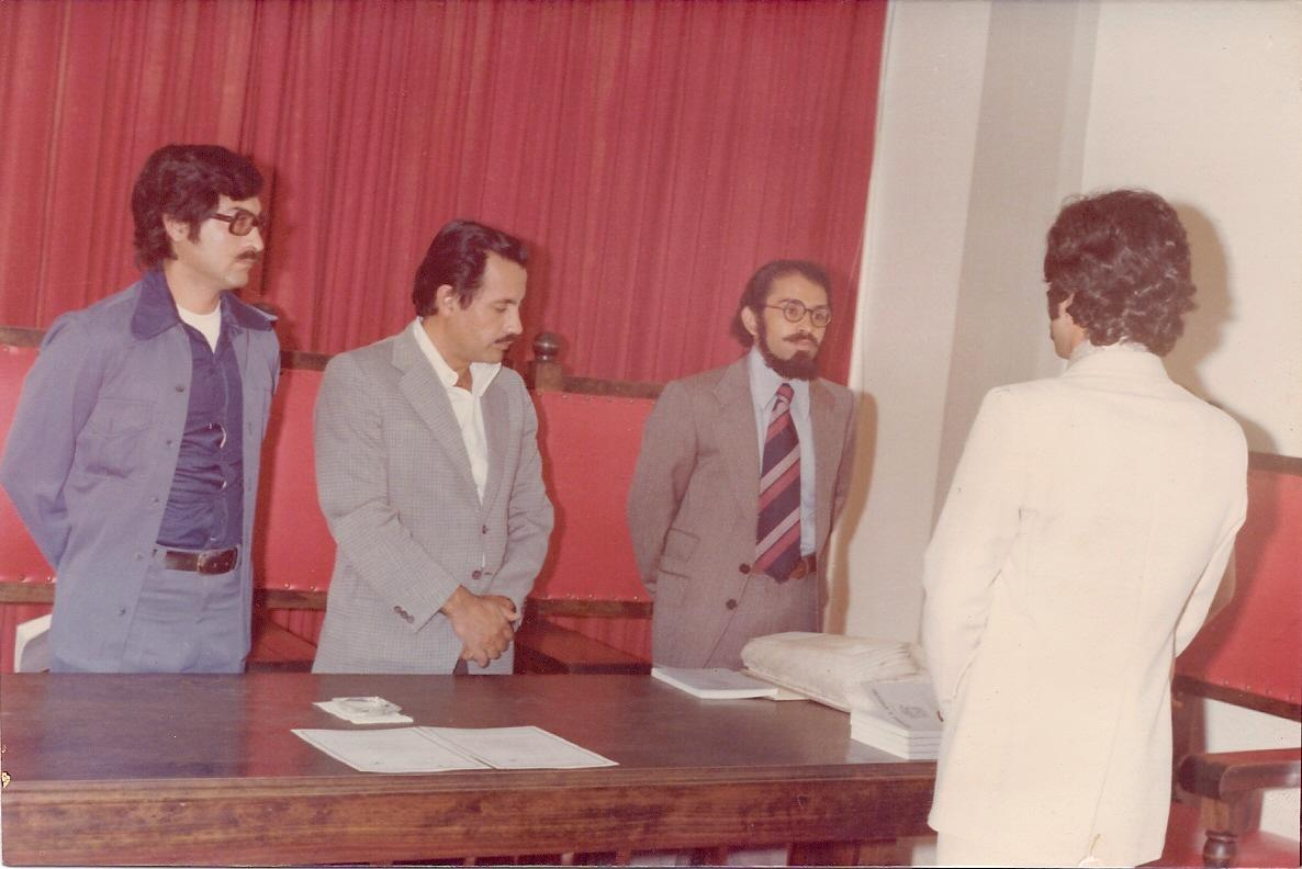 Archivo fotografico de Aurelio Gonzalo Argote Olivera: Evento de Ceremonia de Titulación